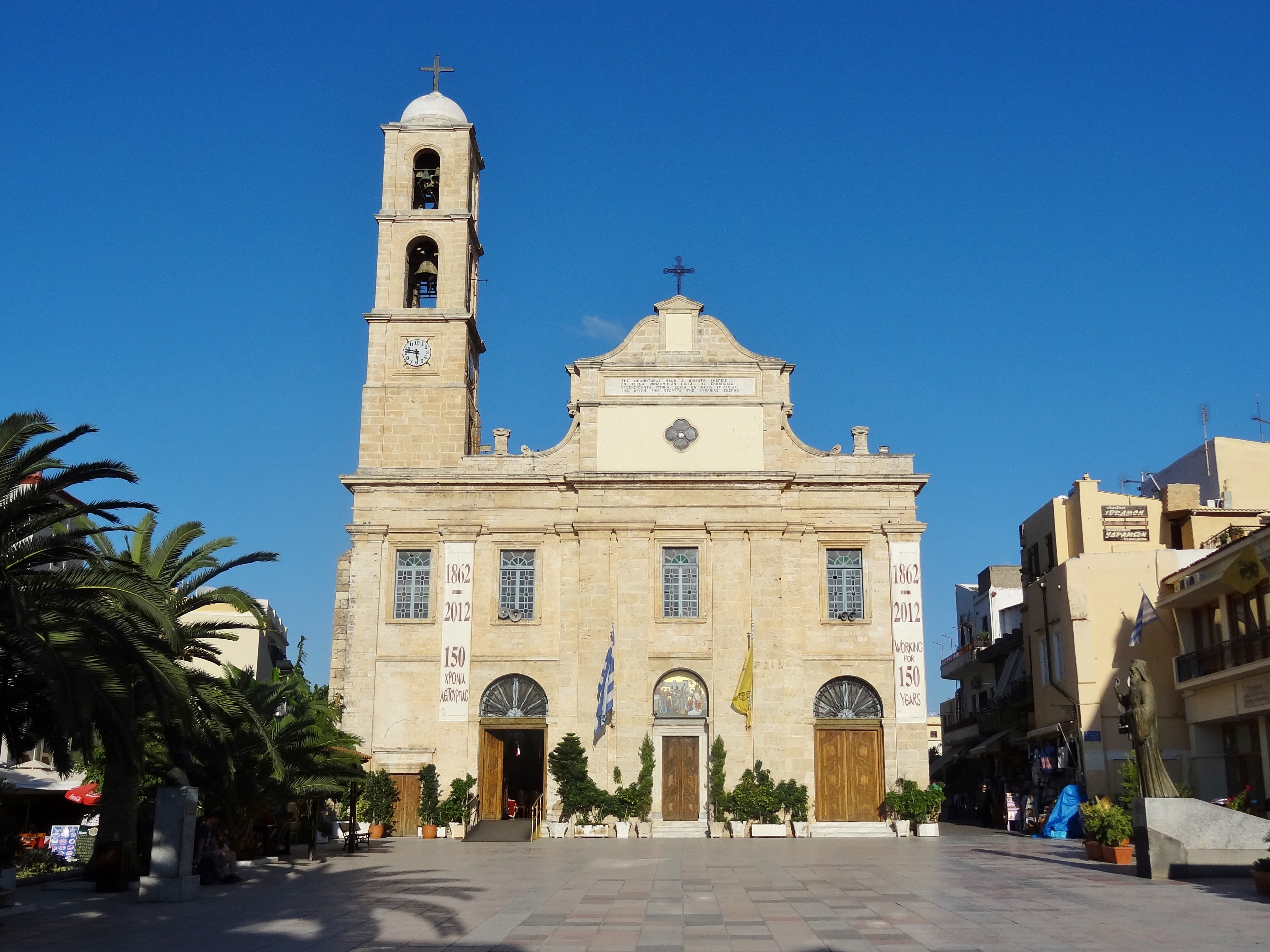 Kathedrale der drei Märtyrer (Εκκλησία της Τριμάρτυρης Ekklisia tis Trimartyris) in Chania, Gemeinde Chania, Regionalbezirk Chania, Kreta, Griechenland